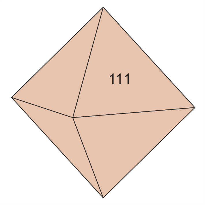 Zeichnung eines Hydrokenopyrochlor-Kristalls mit dem Oktaeder {111} als einziger Flächenform